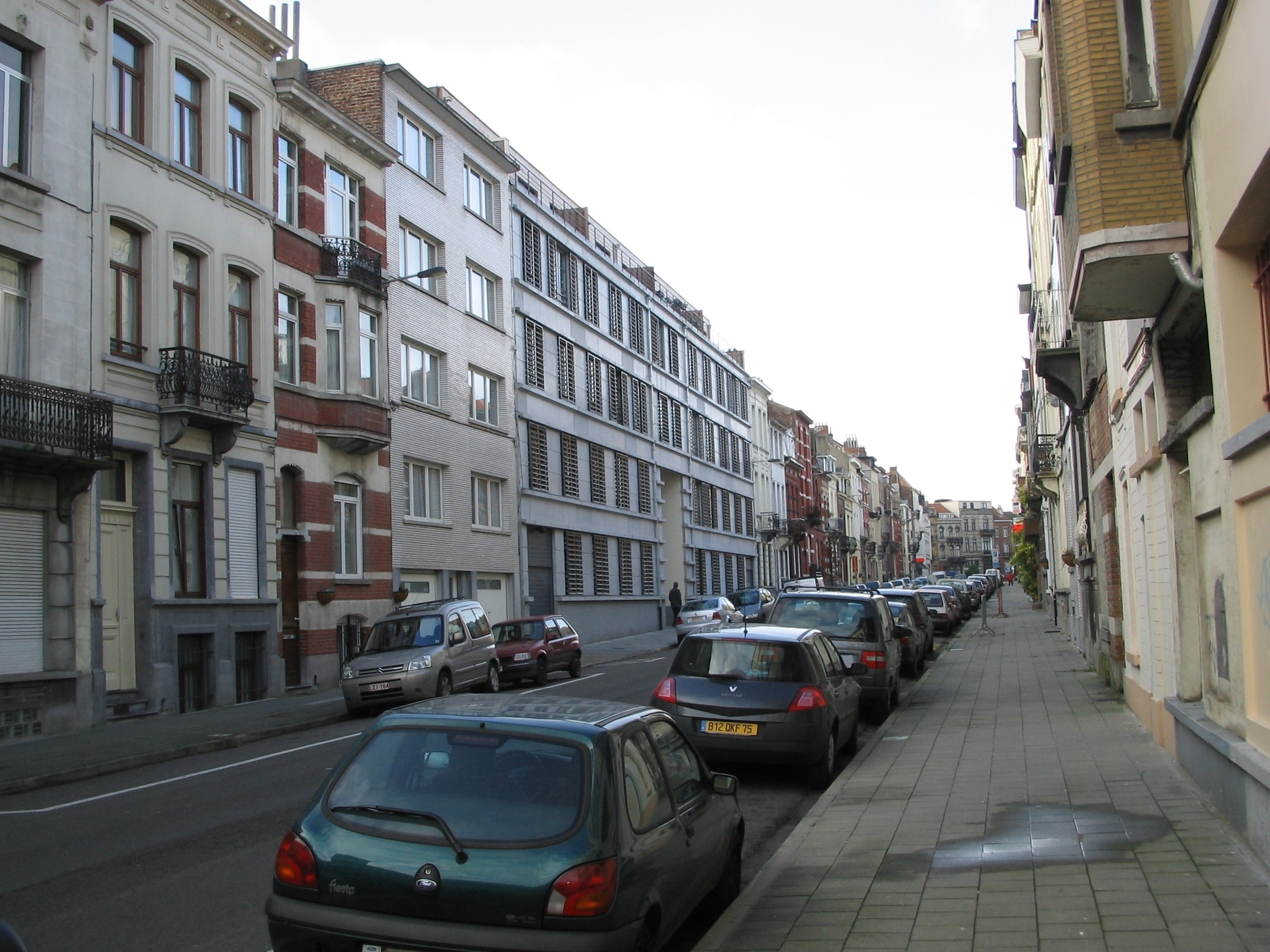 Rue des Archers à Koekelberg.